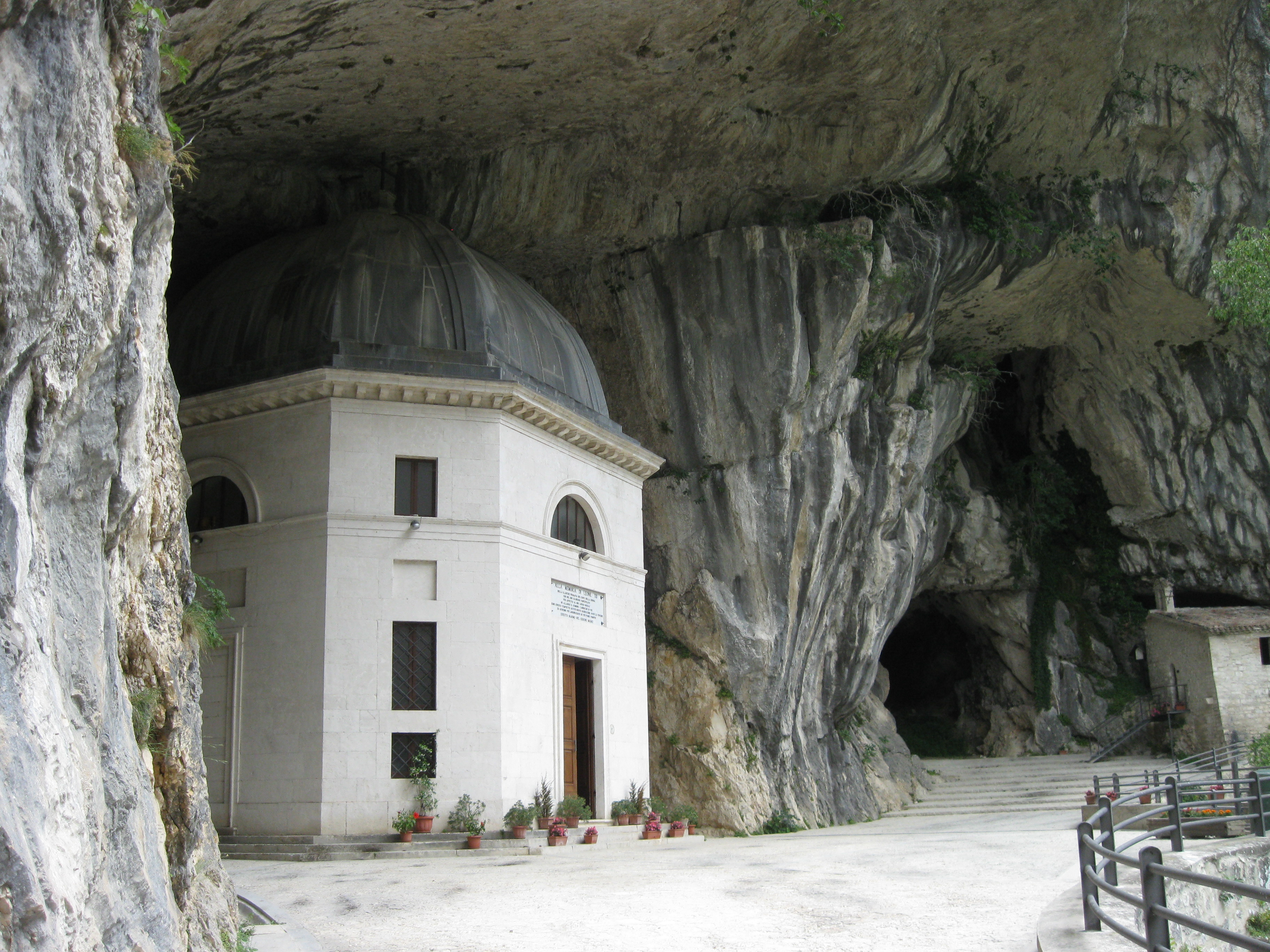 Tempio neoclassico, detto del Valadier, Genga, Italien